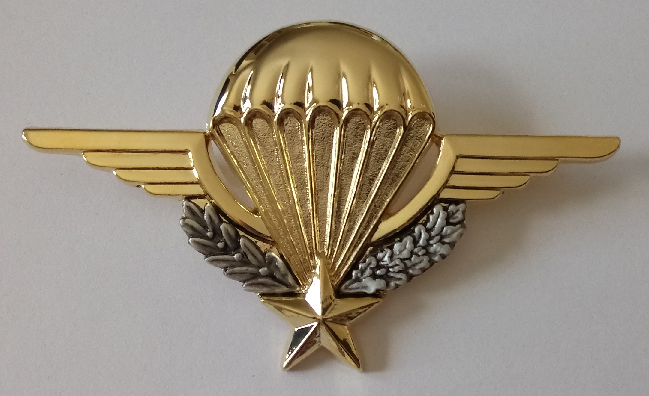 Brevet des cadres TAP